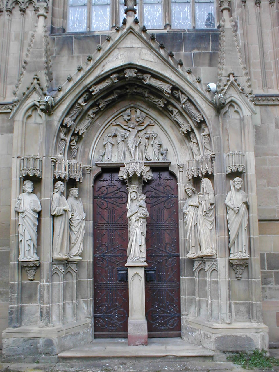 Stiftskirche St. Peter, Bad Wimpfen. Südportal.